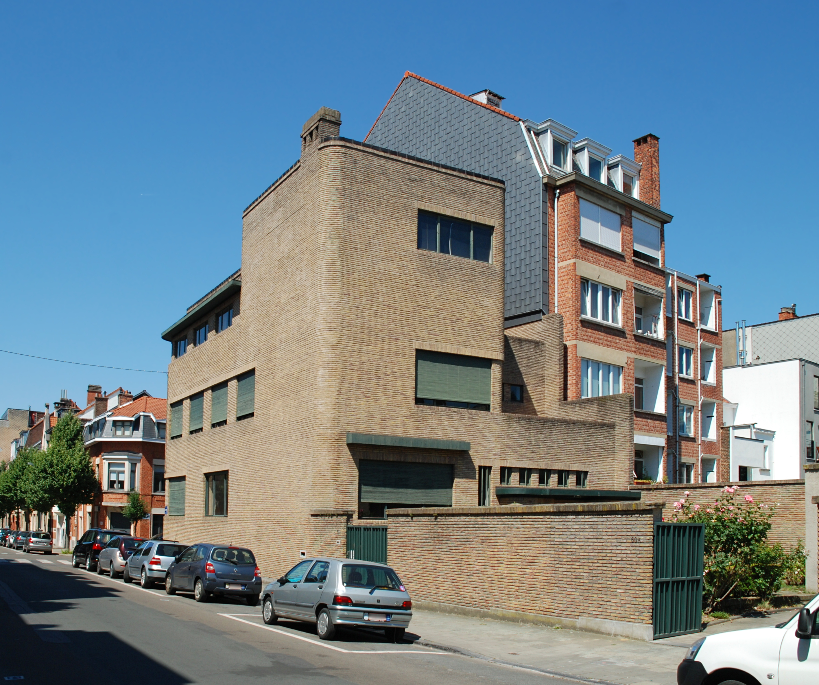 Belgique - Région de Bruxelles-Capitale - Ixelles - Maison Wolfers (modernisme, architecte Henry Van de Velde, 1929)